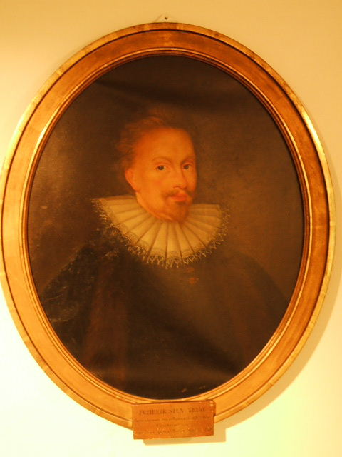 Das Foto zeigt Exponate im Kulturhistorischen Mseum in Stralsund in Stralsund im März 2007.